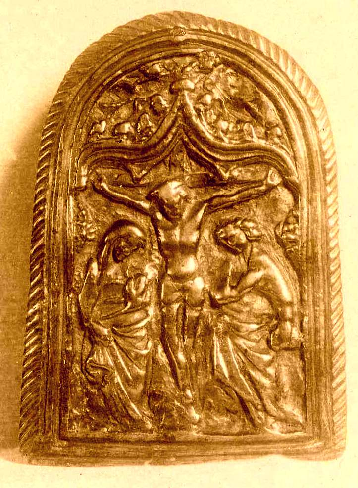 Osculatoire du XVe siècle.